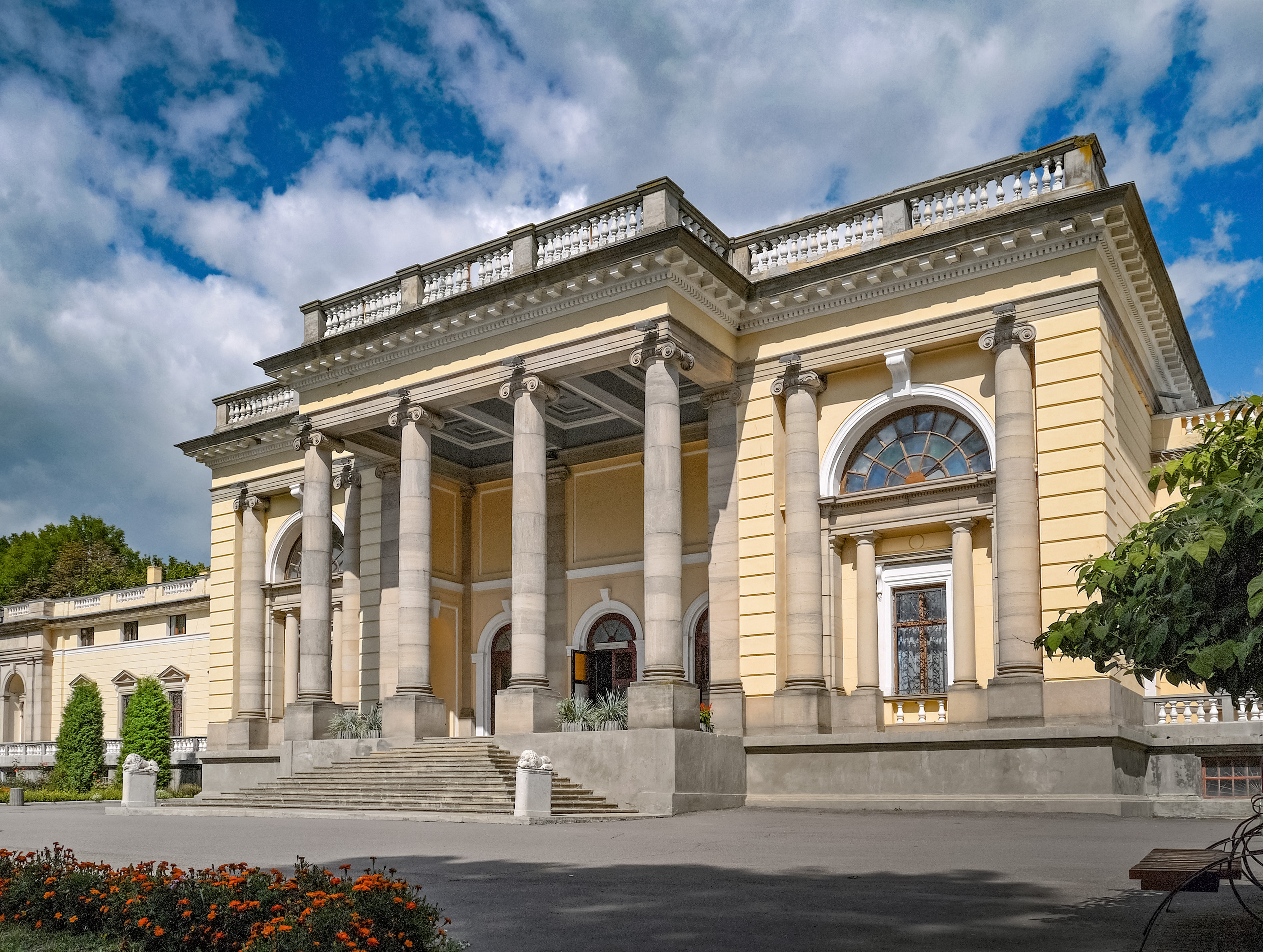 Палац княгині М. Щербатової, Немирів, вул. Шевченка, 16